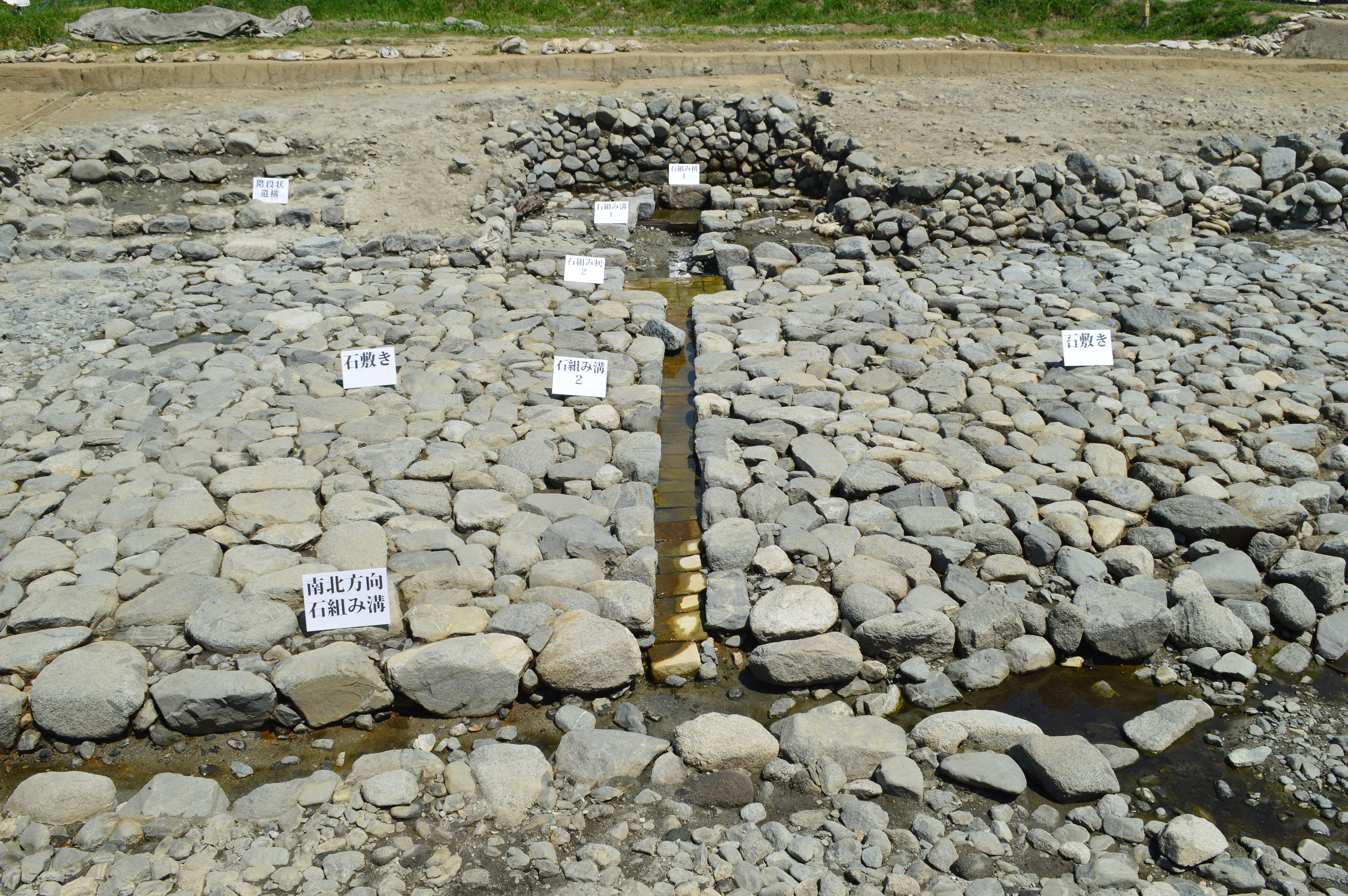 飛鳥京跡苑池 北池 (2019年8月発掘調査時)